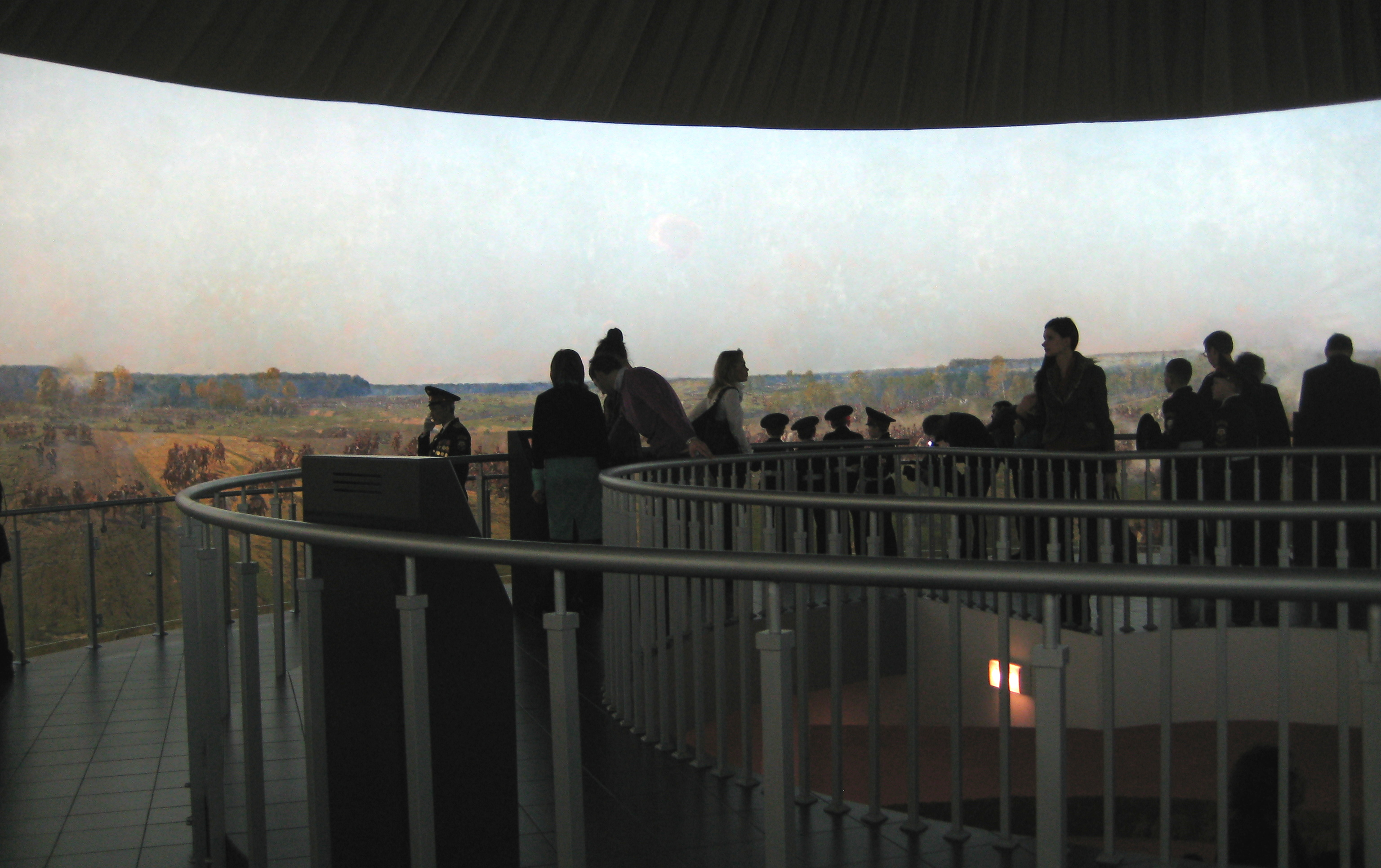 Музей "Бородинская панорама". Вид панорамы